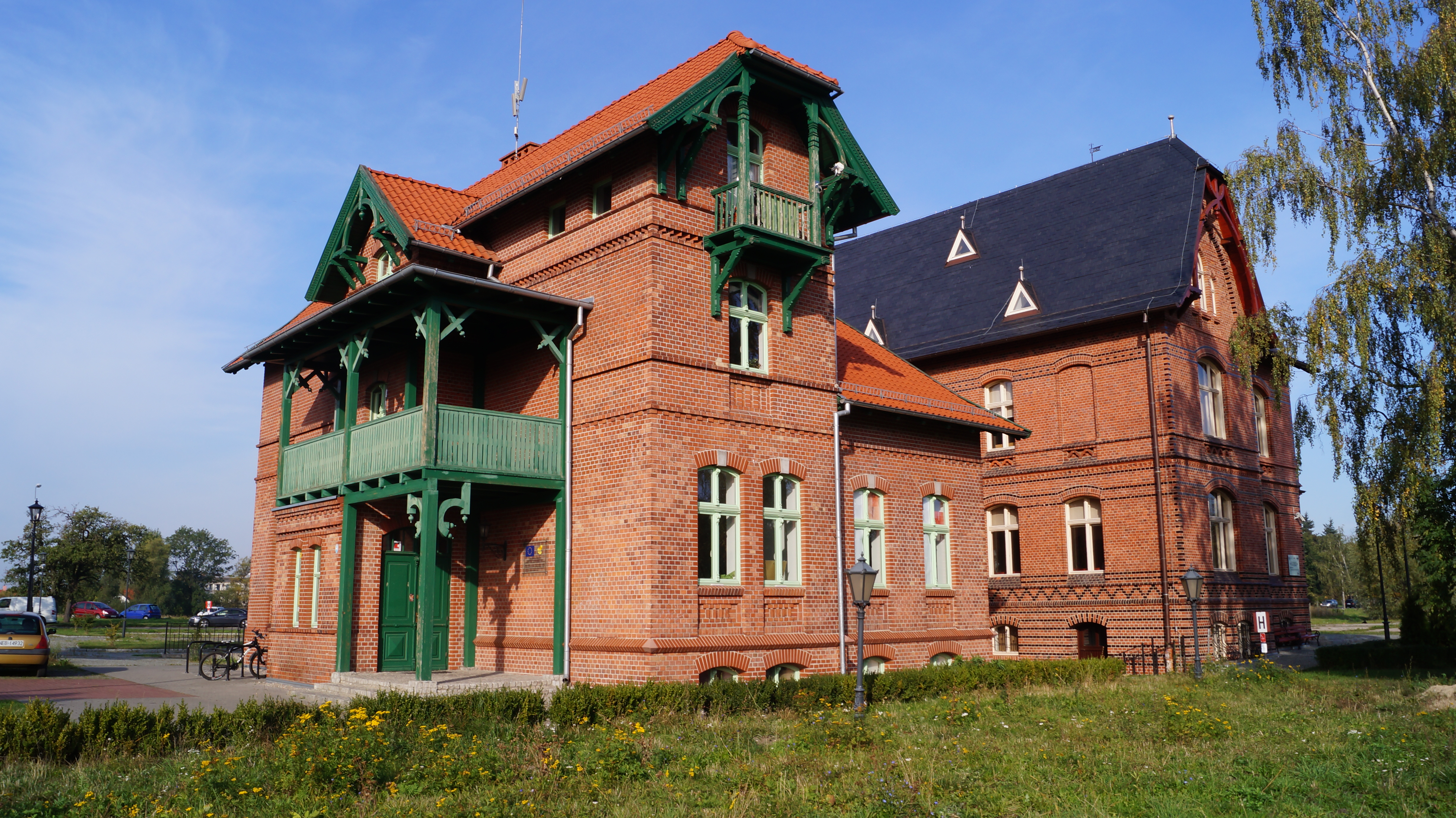 Elbląg, willa, XIX/XX